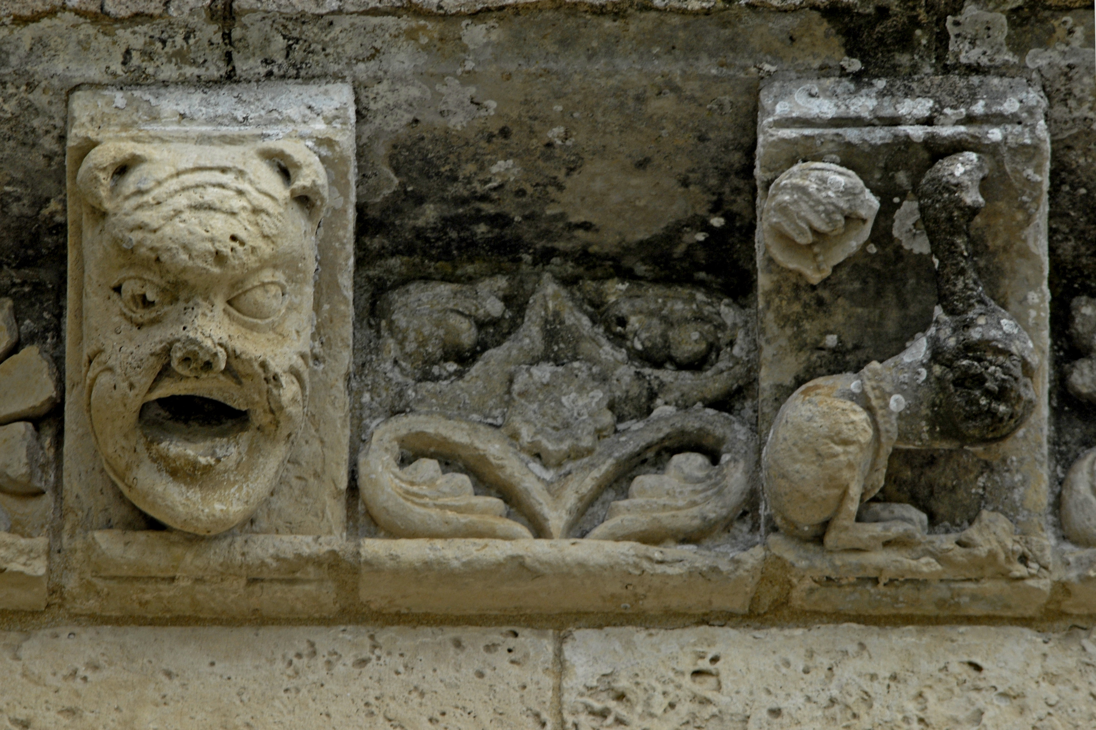 St.-Pierre Aulnay, Kragsteingesims über Hauptportal